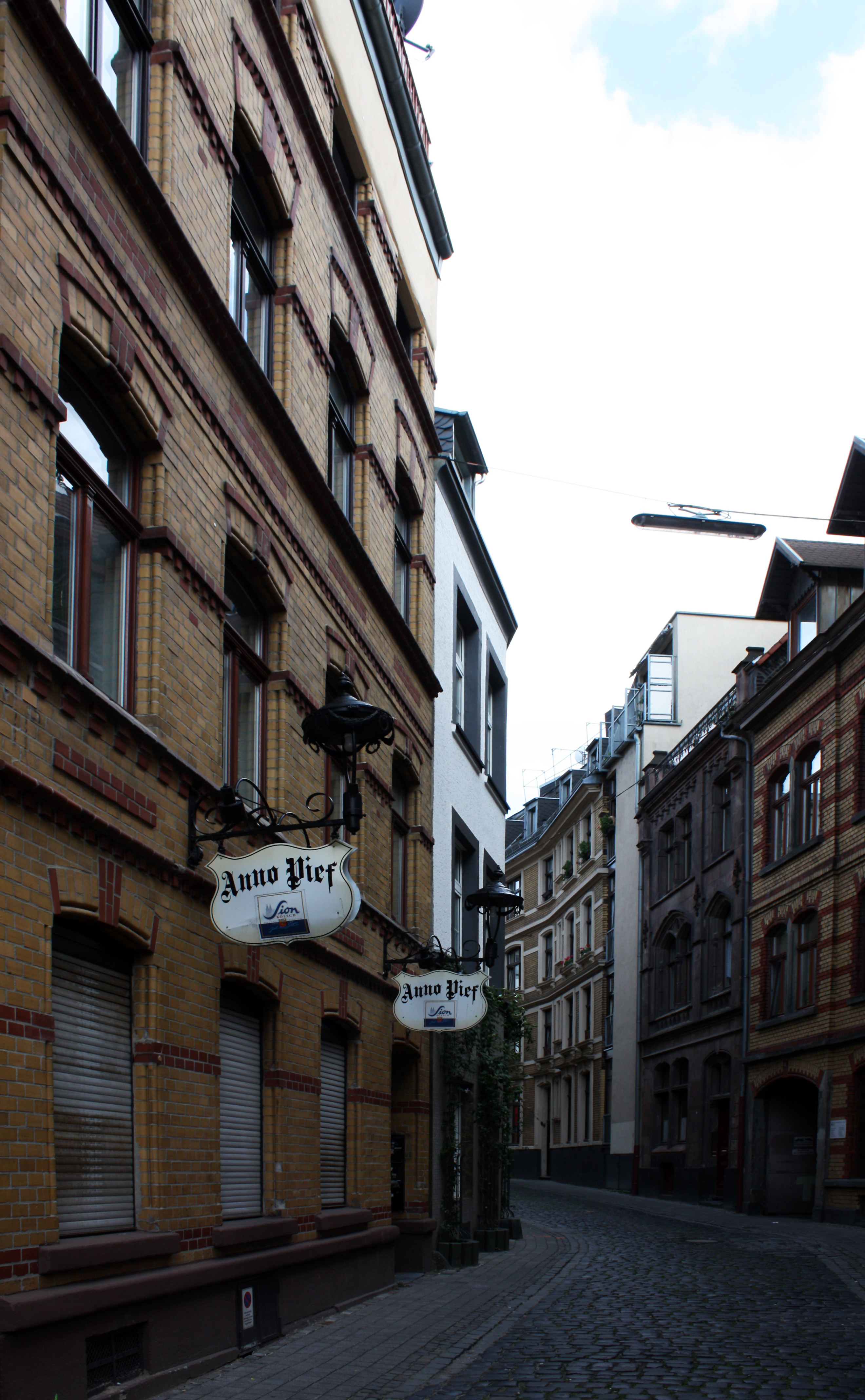 Straßa "Im Stavenhof", Köln Eigelsteinviertel